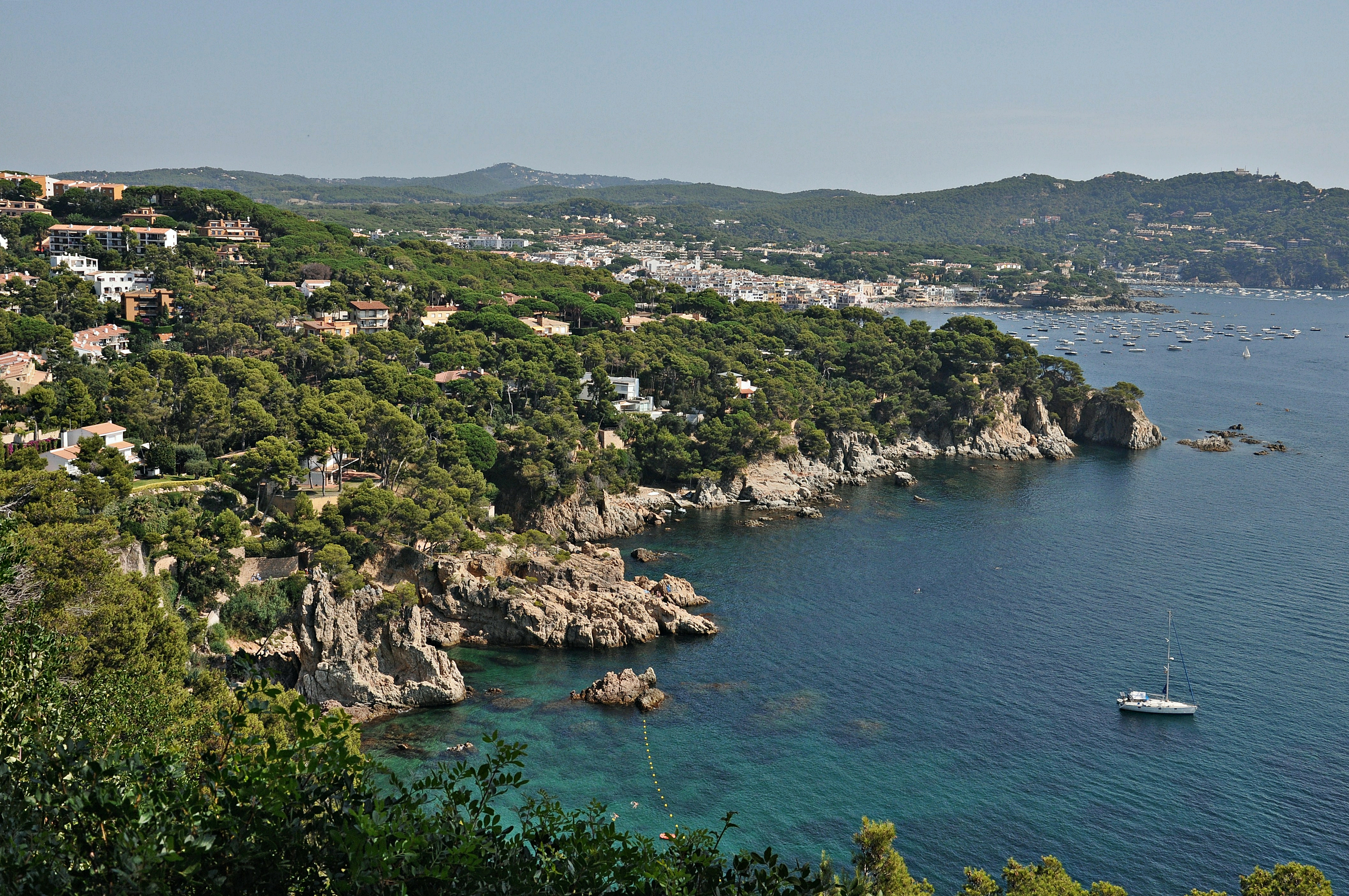 baix emporda-cataluña